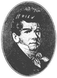 Ernst Benjamin Salomo Raupach (May 21, 1784 - March 18, 1852), German dramatist